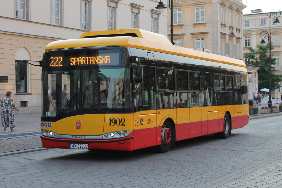 Warszawski autobus elektryczny Solaris Urbino 12 electric na ul. Krakowskie Przedmieście.